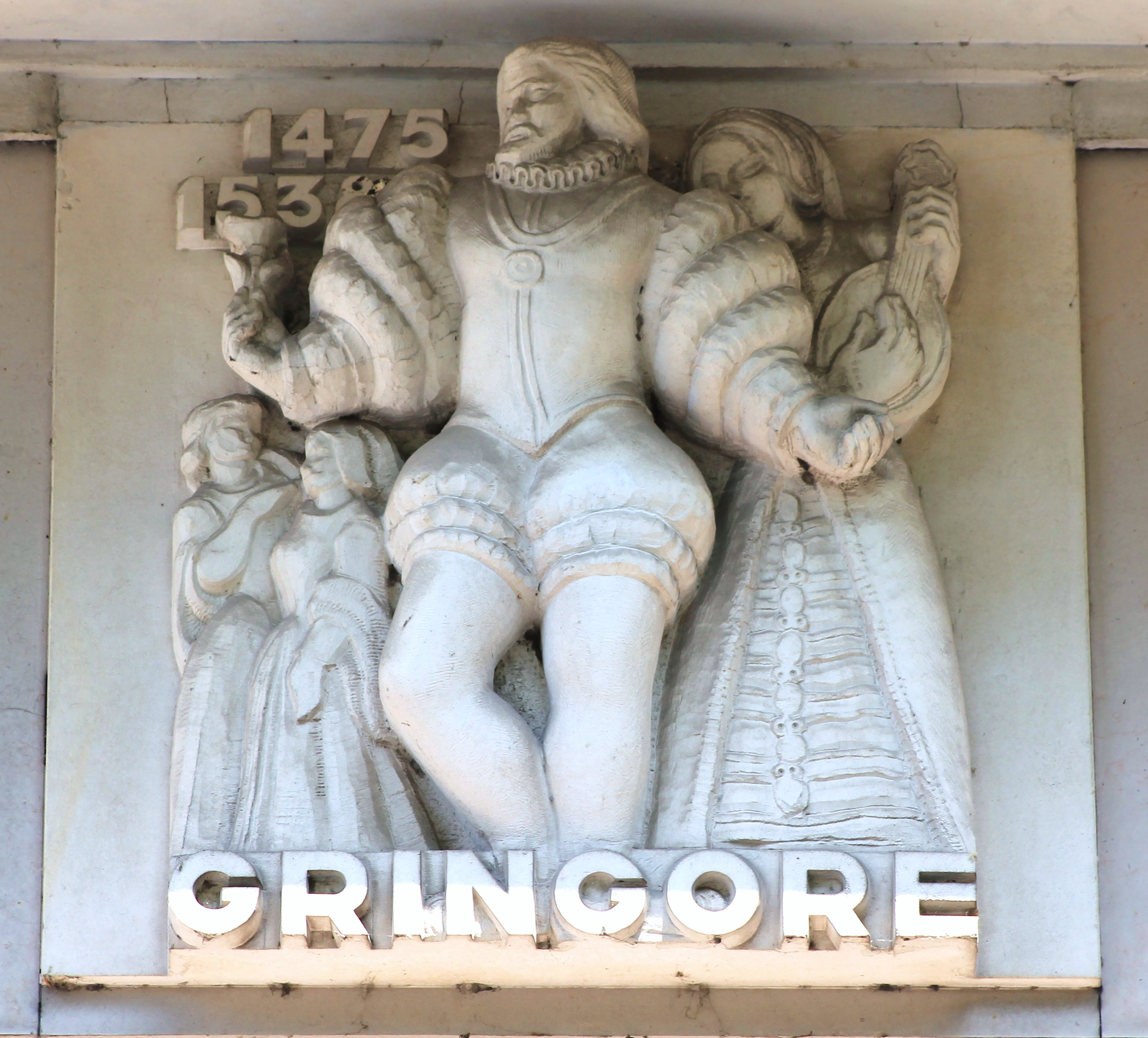 Bas-relief sur la façade de l'hôtel Malherbe à Caen (Calvados). Pierre Gringore